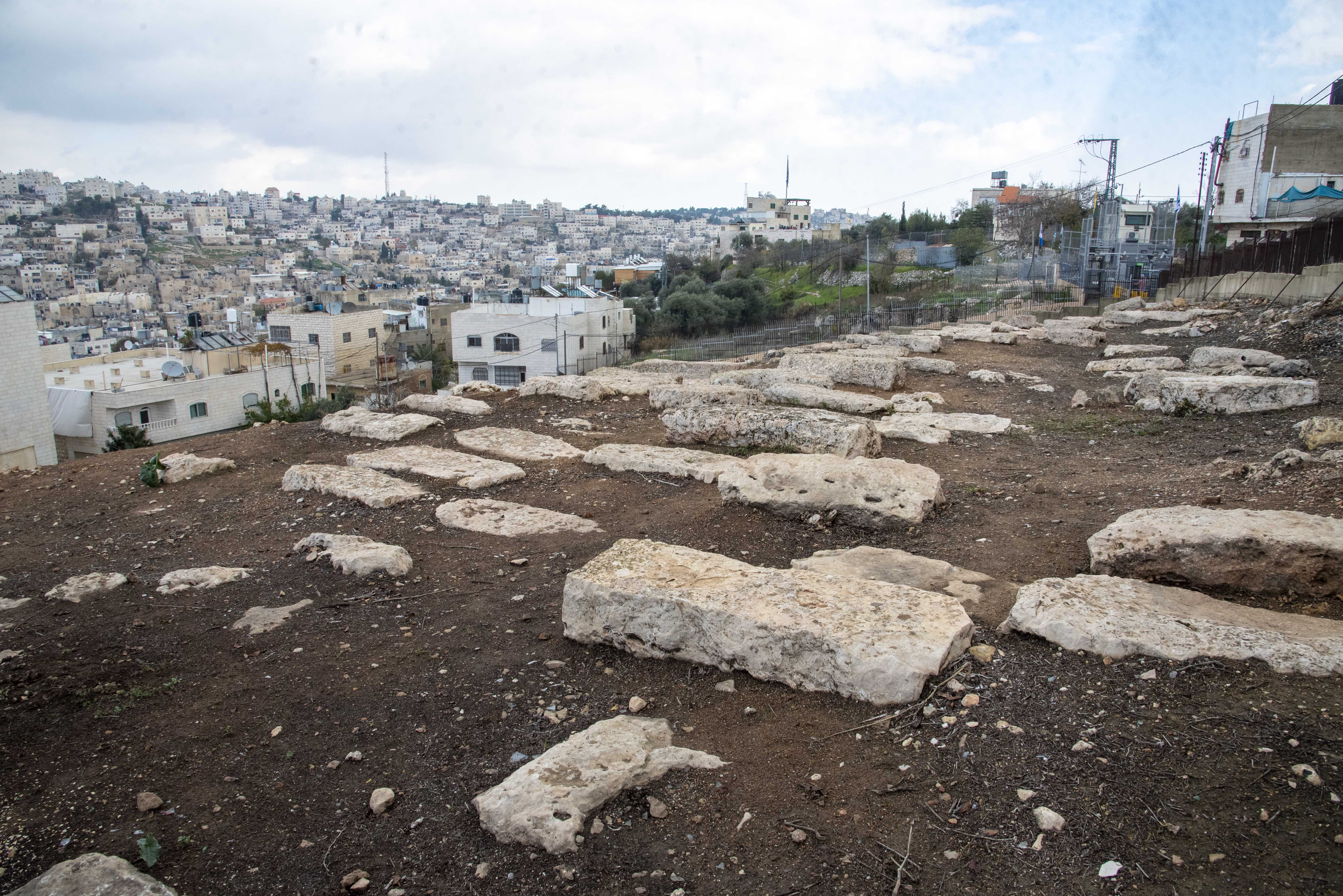 בית העלמין היהודי העתיק בחברון